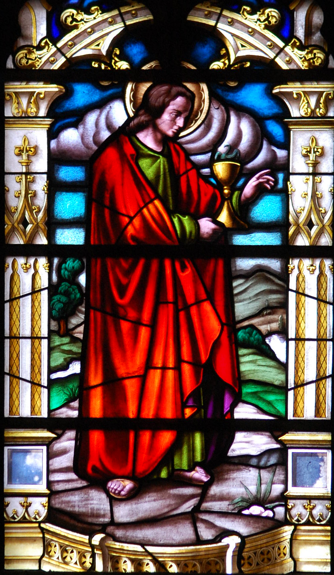 Vidriera policromada de la Catedral de Alcalá de Henares representando a San Félix de Alcalá.